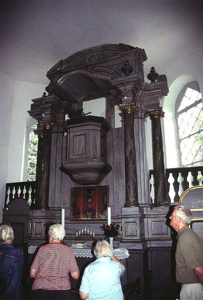 Alterpartiet i Damsholte Kirke Møn Kommune, Denmark